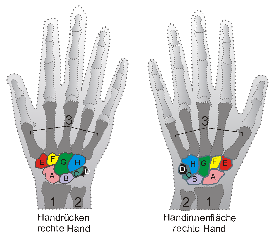 Schema des Handgelenks Handgelenk (schematisch): A Kahnbein (Os scaphoideum) B Mondbein (Os lunatum) C Dreiecksbein (Os triquetrum) D Erbsenbein (Os pisiforme) E Großes Vieleckbein (Os trapezium) F Kleines Vieleckbein (Os trapezoideum) G Kopfbein (Os capitatum) H Hakenbein (Os hamatum) 1 Speiche (Radius) 2 Elle (Ulna) 3 Mittelhandknochen (Ossa metacarpalia) Als Vorschlag für Bildunterschrift in der Wikipedia verfügbar.